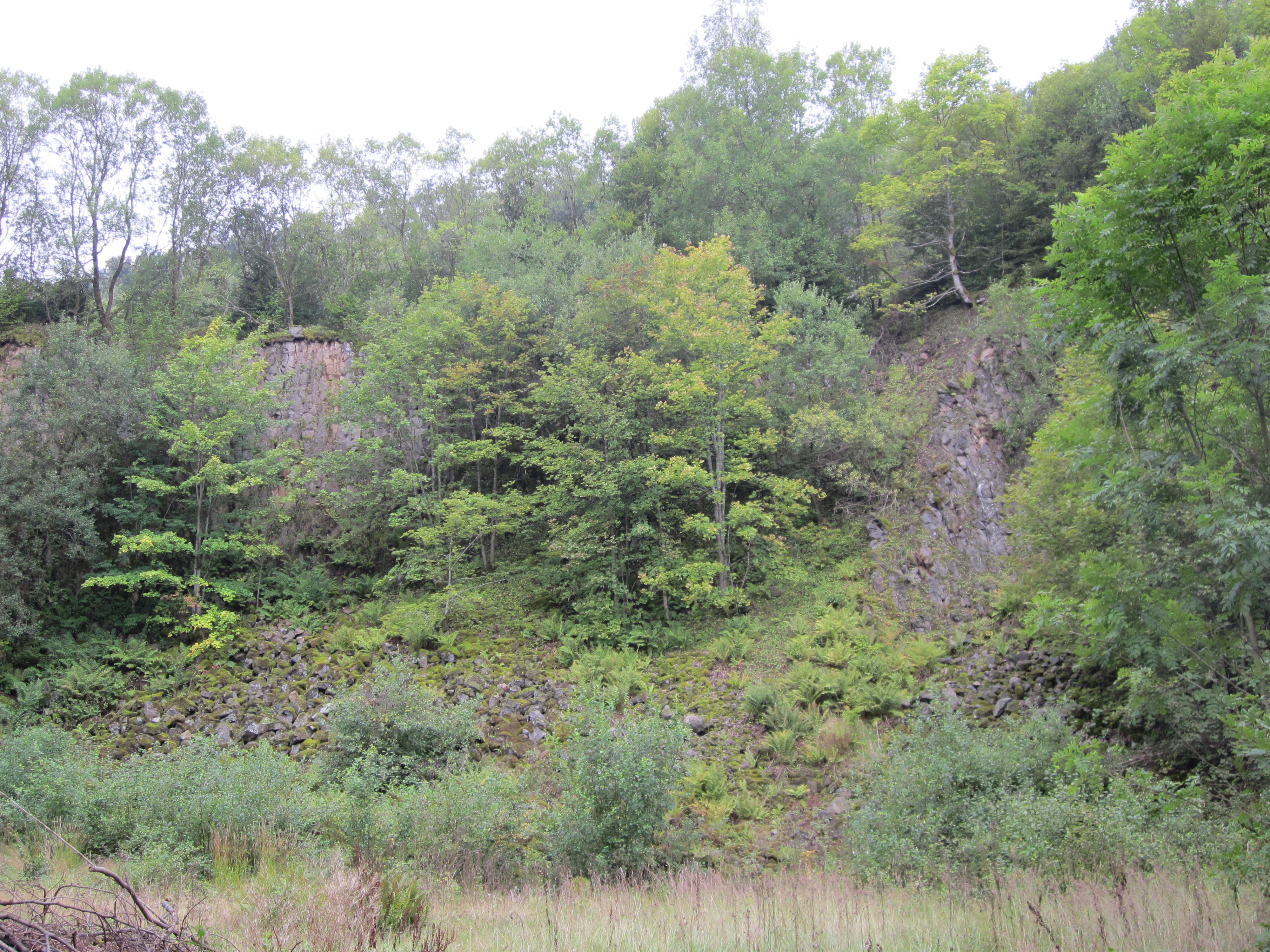 NSG Schwarze Berge in der Bayer. Hochrhön, alter Basaltsteinbruch am Kellerstein